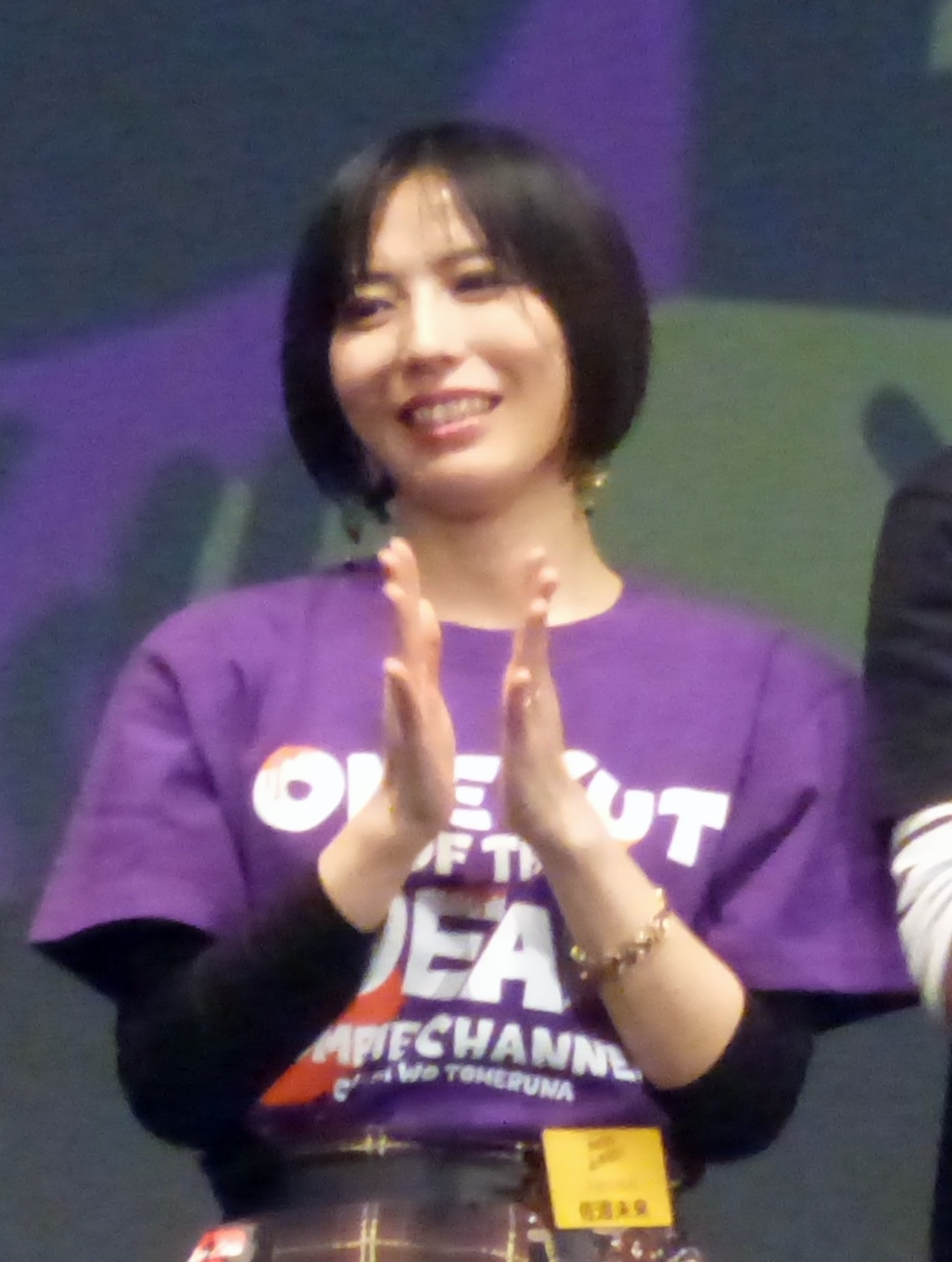 佐渡未来（2018年11月22日、Zeppダイバーシティ東京「最高かよ〜！『カメ止め！』アツアツ感染者集会〜ポンデミック2018〜」）